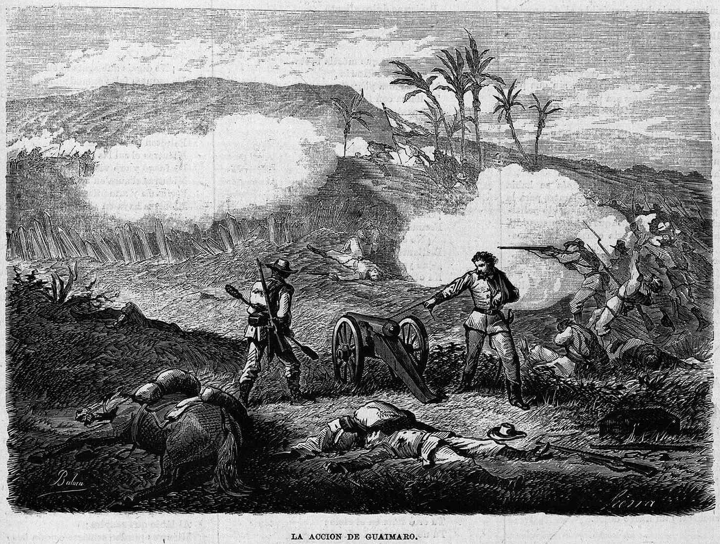 La acción de Guaimaro, en la revista La Ilustración de Madrid.